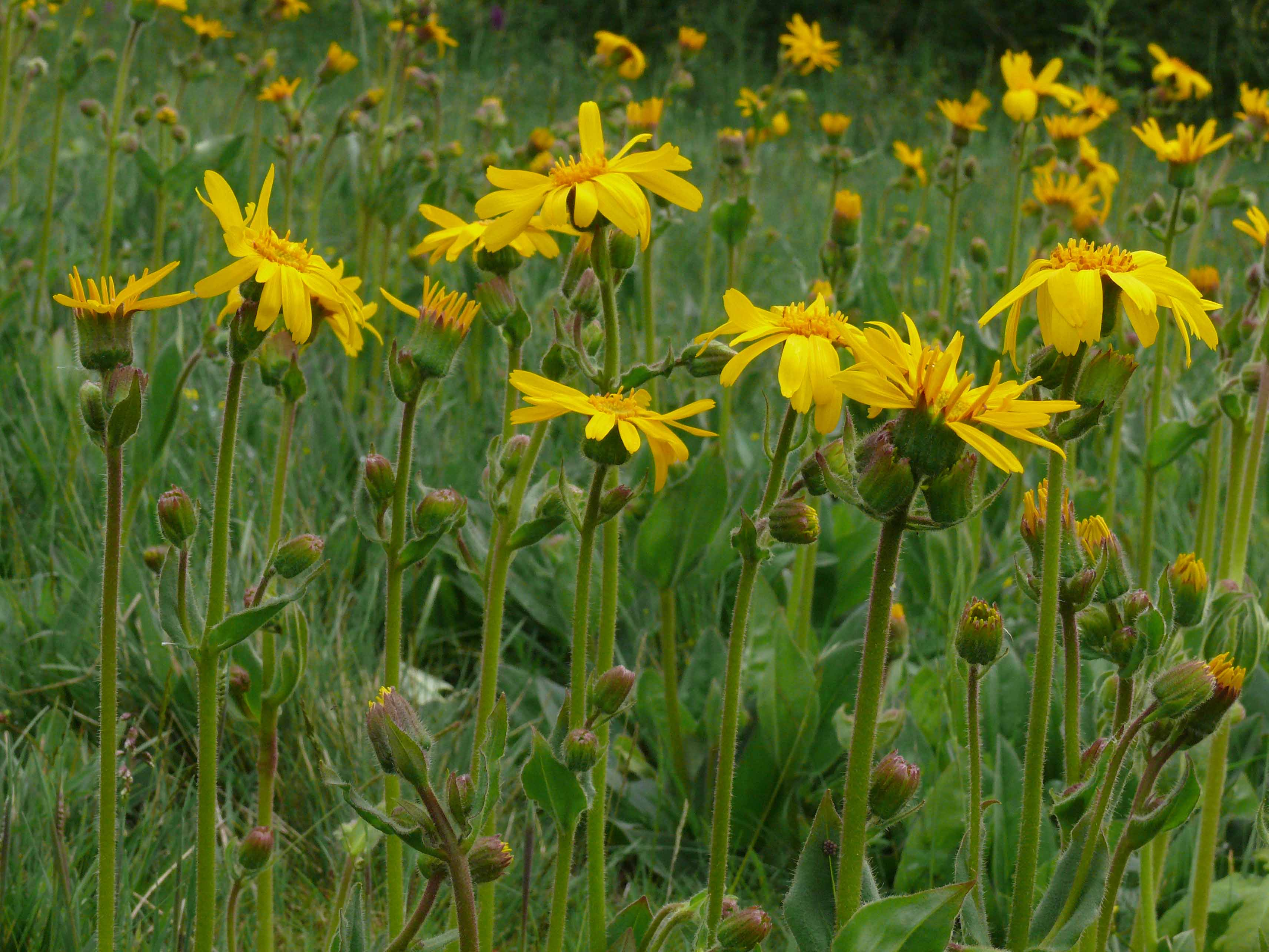 Borstgrasrasen Arnika